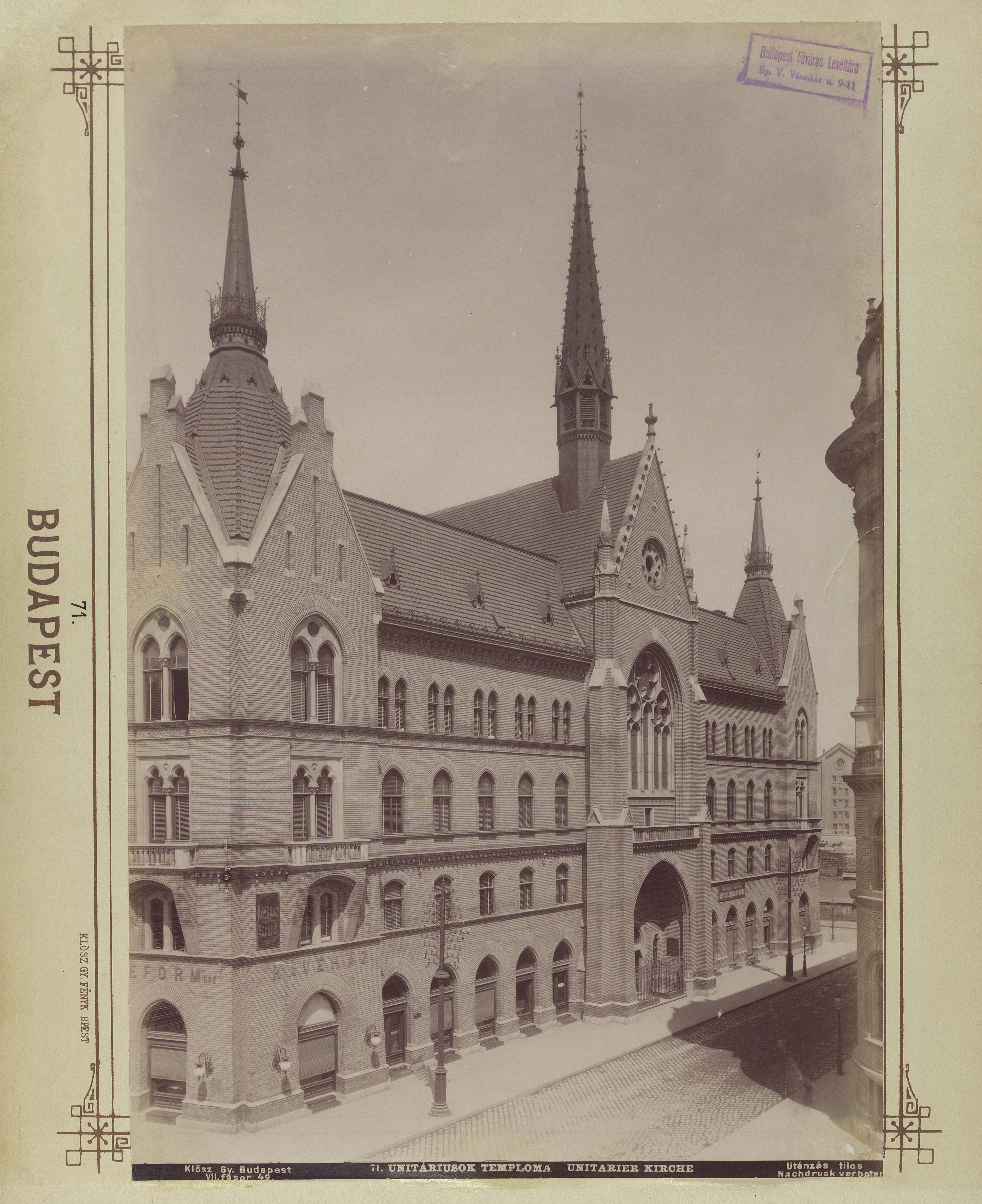 Nagy Ignác utca 2-4. Unitárius templom és bérház. A felvétel 1890 után készült. A kép forrását kérjük így adja meg: Fortepan / Budapest Főváros Levéltára. Levéltári jelzet: HU.BFL.XV.19.d.1.07.072 Location: Hungary, Budapest V. Tags: Budapest